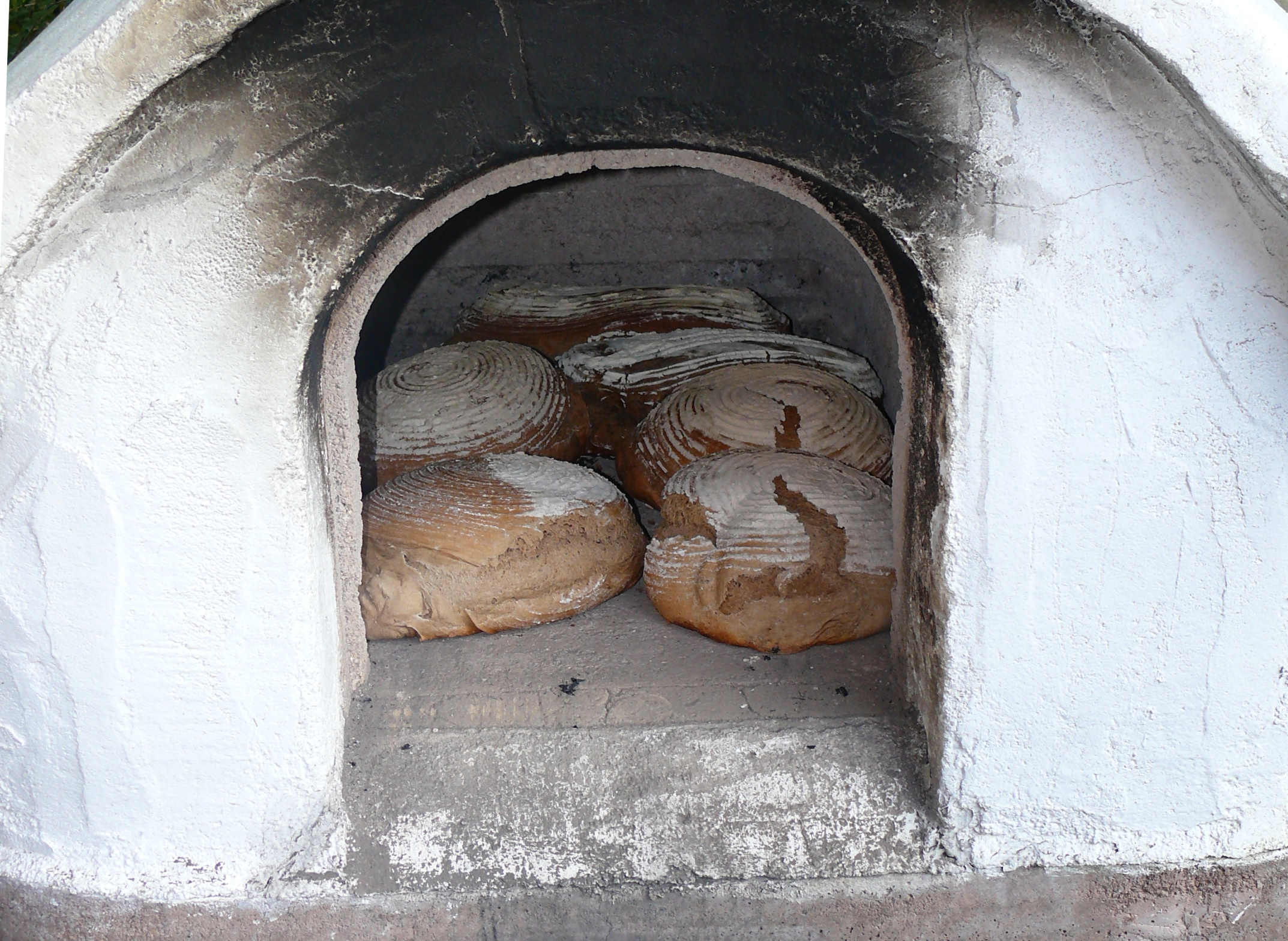 Steinofen für Pizza und Brot